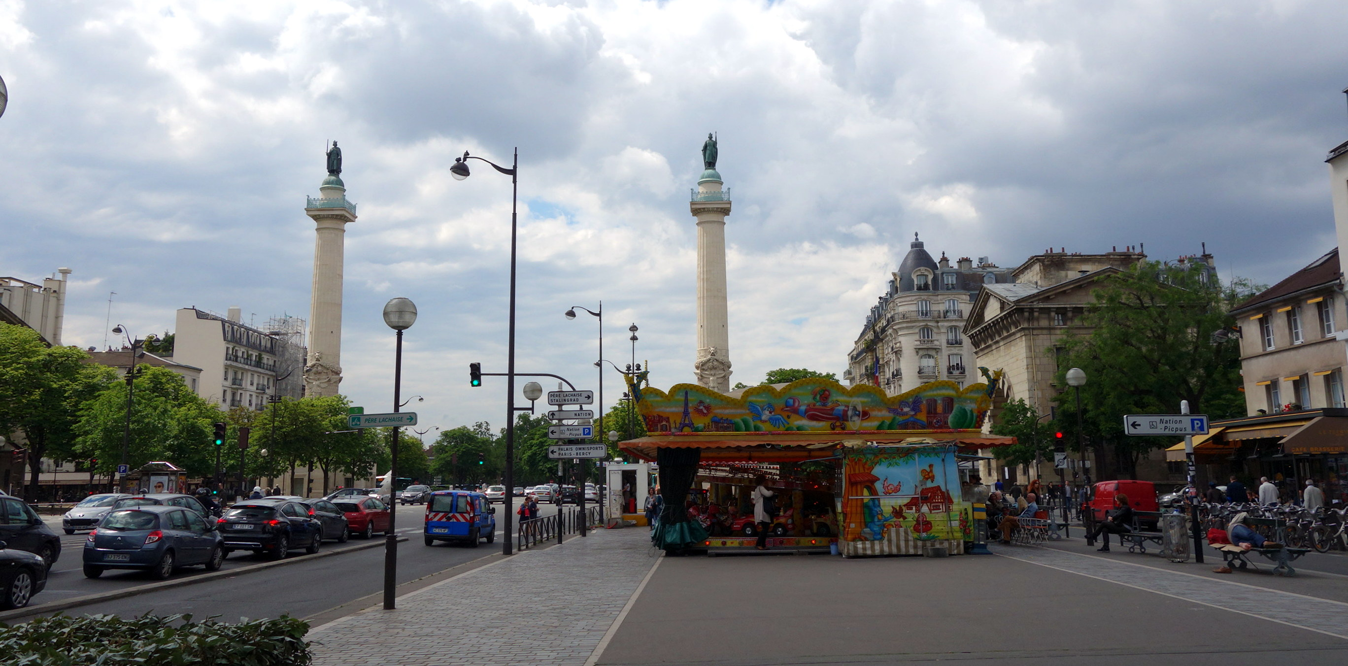 Cours de Vincennes-001